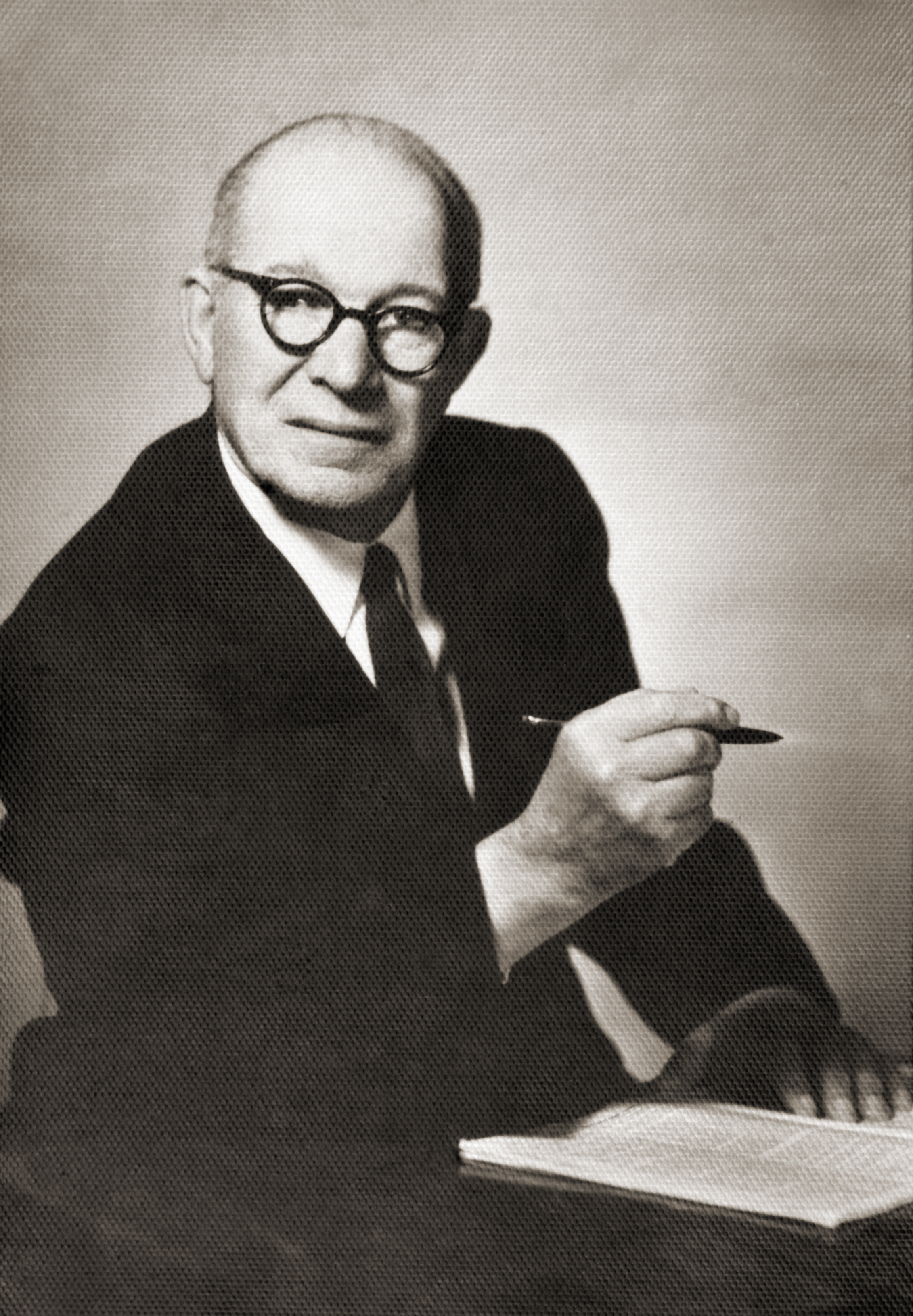 Dominik Hollmann (12.08.1899 - 06.12.1990), russlanddeutscher Schriftsteller. Aufnahme 1968